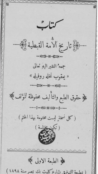 مصرى: تاريخ الامه القبطيه